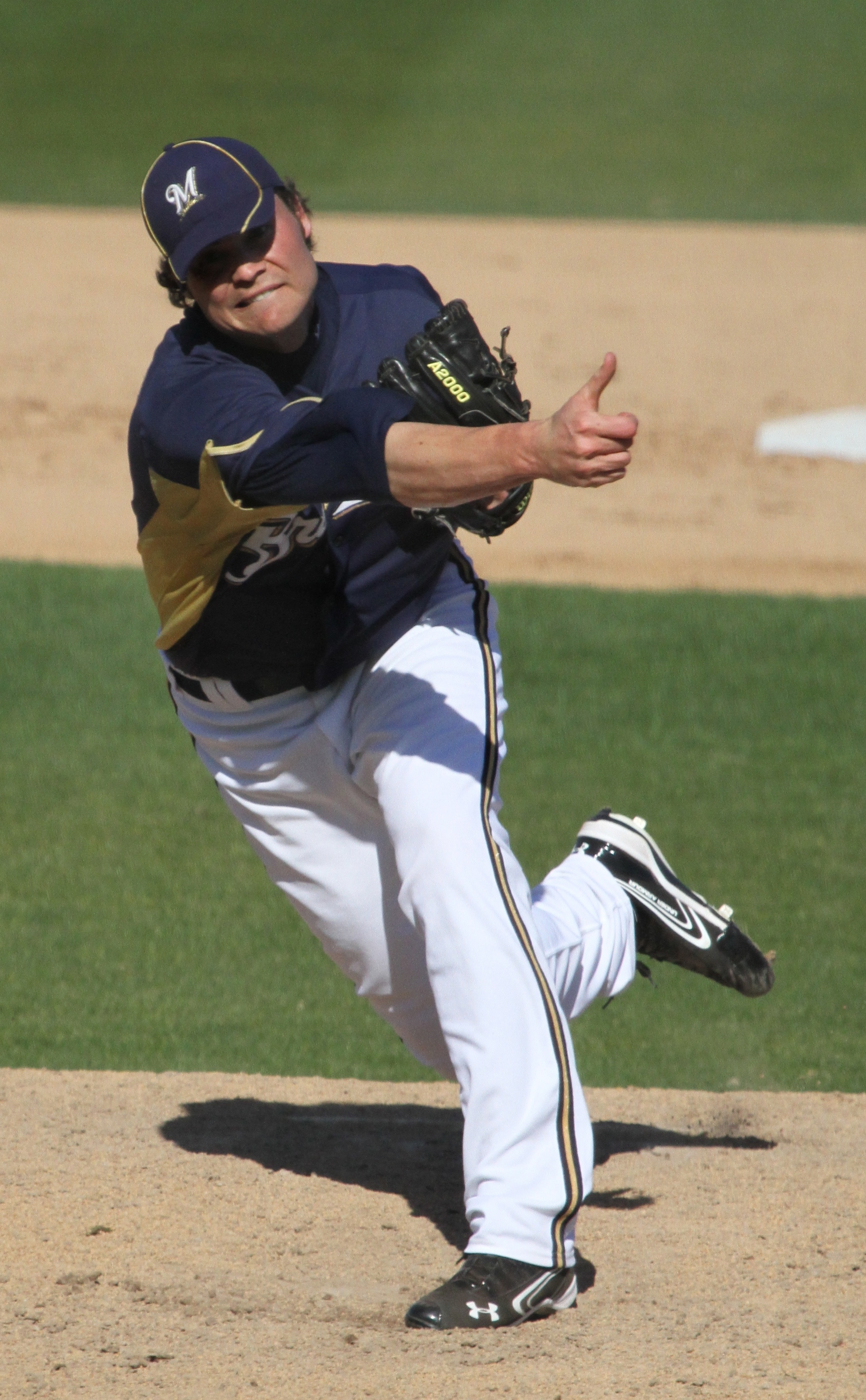 Tim Dillard